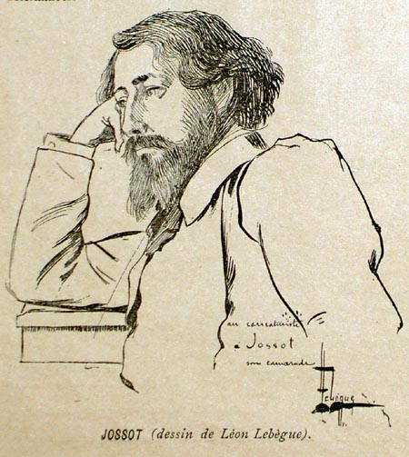 Henri Gustave Jossot, né à Dijon le 16 avril 1866 et mort à Sidi Bou Saïd le 7 avril 1951, est un dessinateur, caricaturiste, peintre, affichiste et écrivain français.(dessin Léon Lebègue 1863-1944)